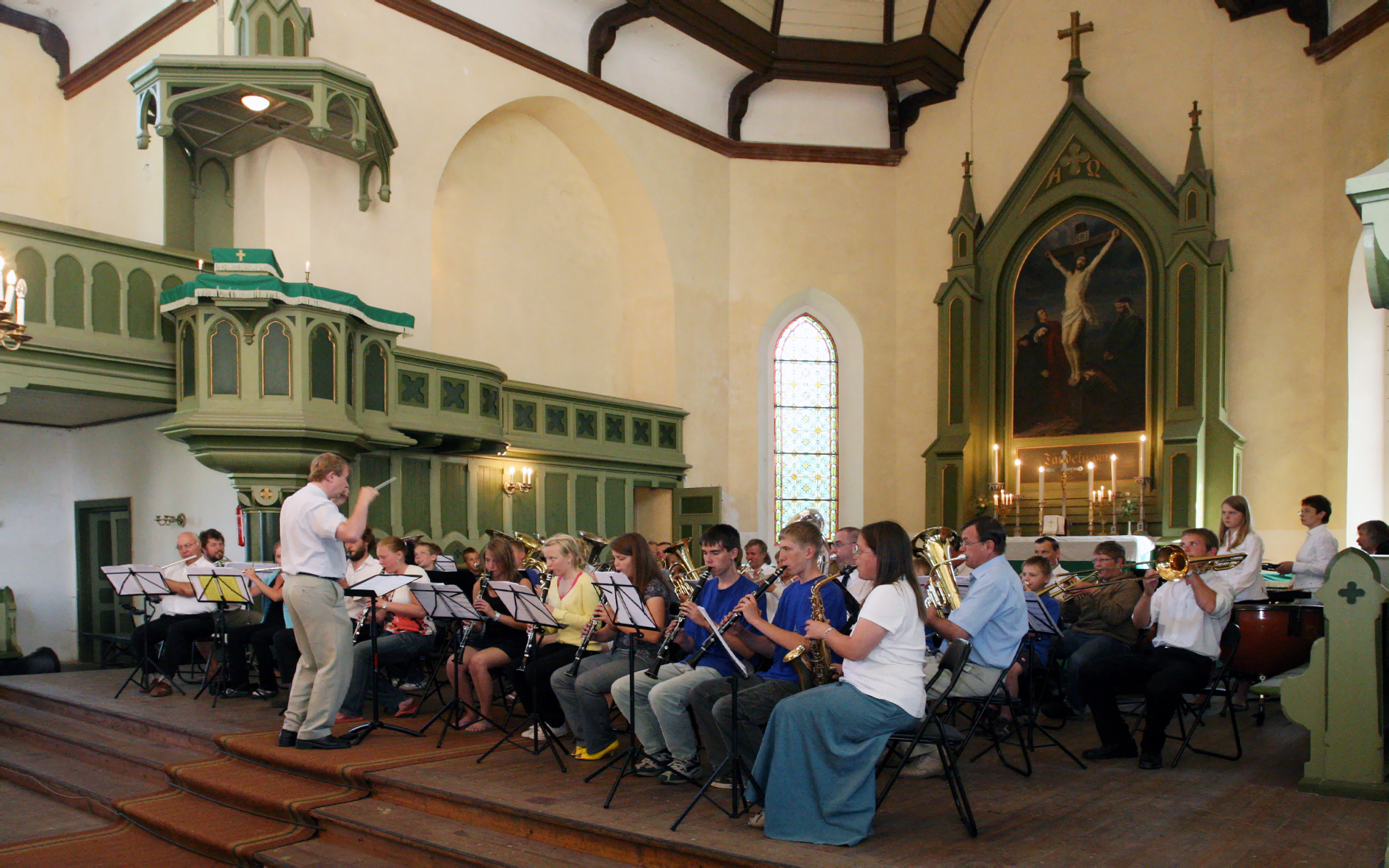 Pühajärve Puhkpillipäevad, lõppkontsert Rõngu kirikus